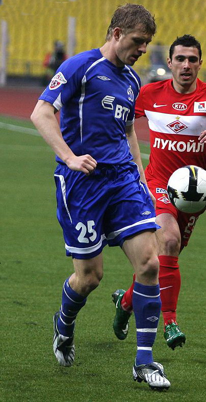 Denis Kolodin